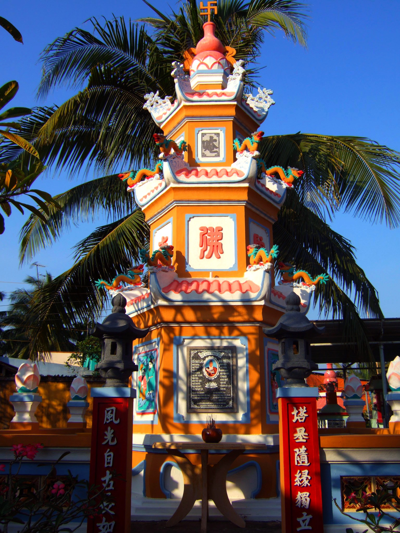 My Tho, Mekong Delta, Vietnam